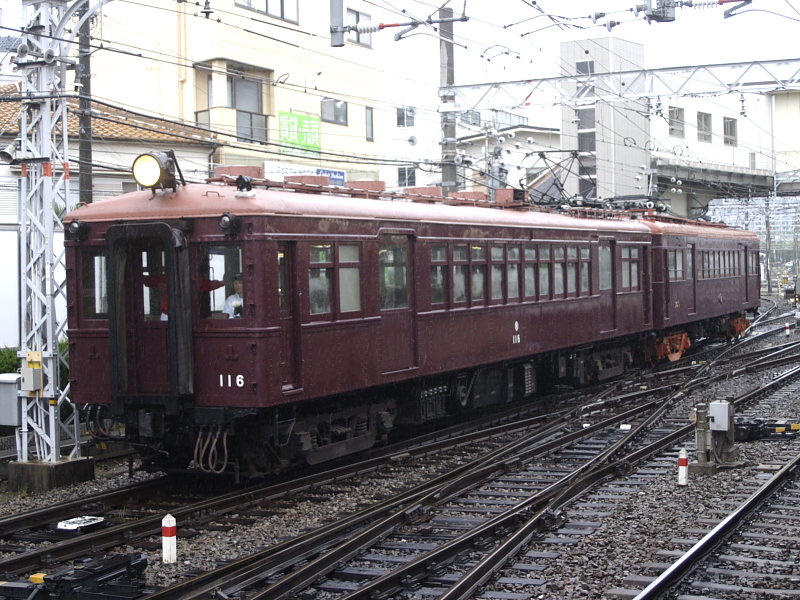 阪急電鉄116号 正雀駅にて イベント終了時の入れ換え時にて撮影